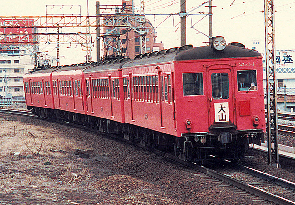 名古屋鉄道 2834